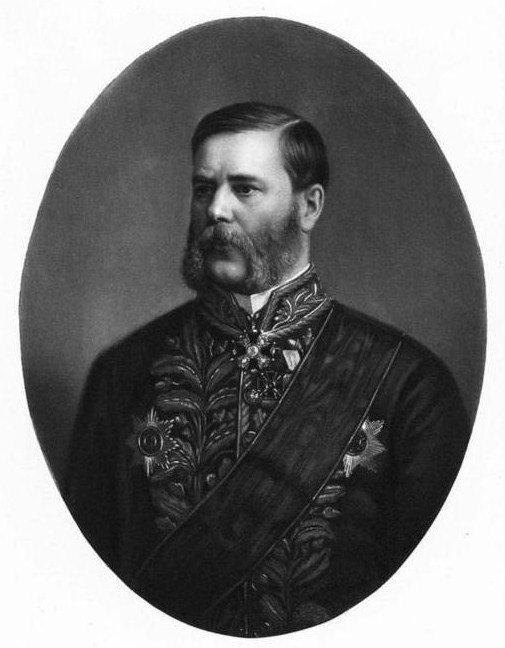 Александр Агеевич Абаза